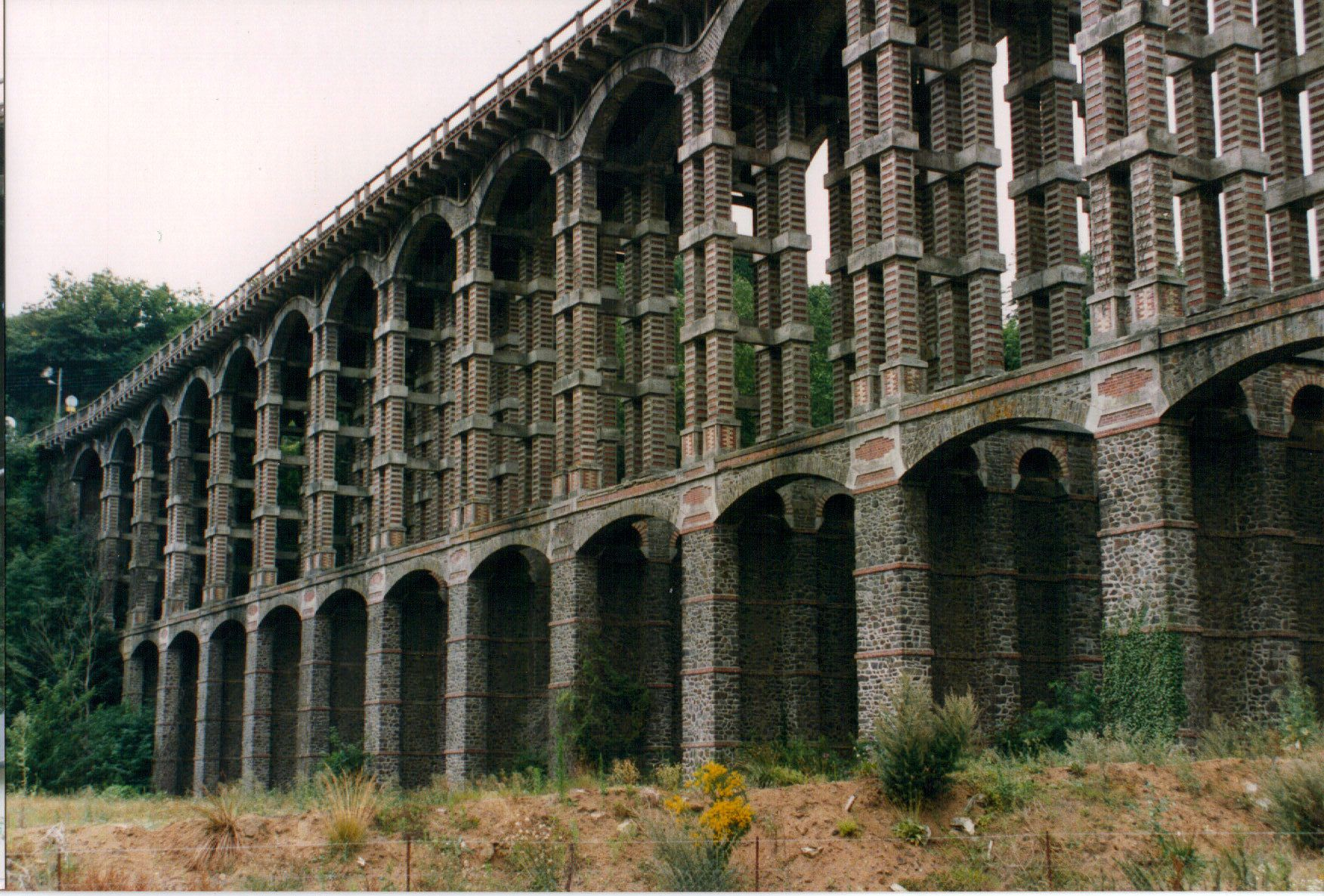 viaduc de Souzain